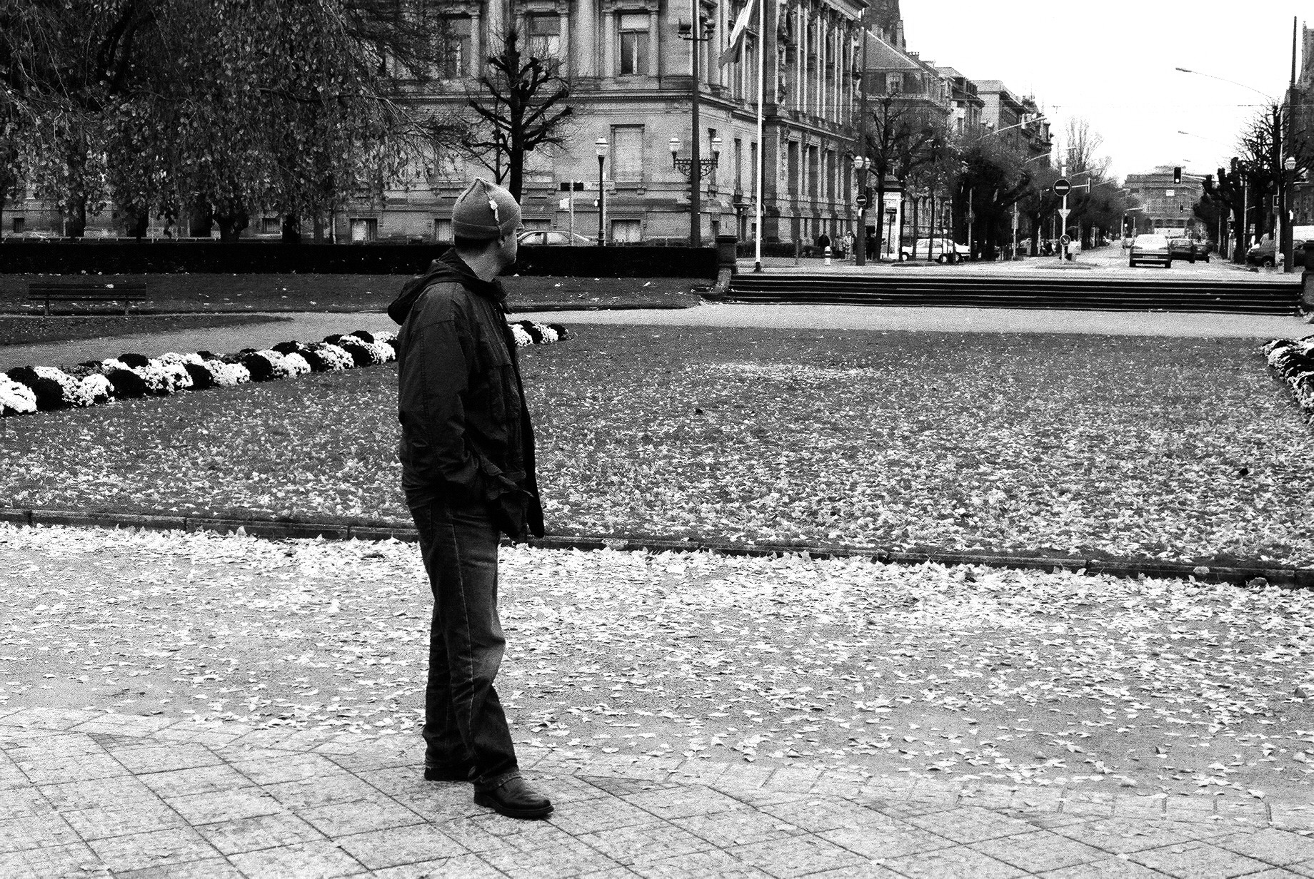 Georges Federmann, place de la République à Strasbourg, Décembre 2002. (photographié par son fils David Federmann)